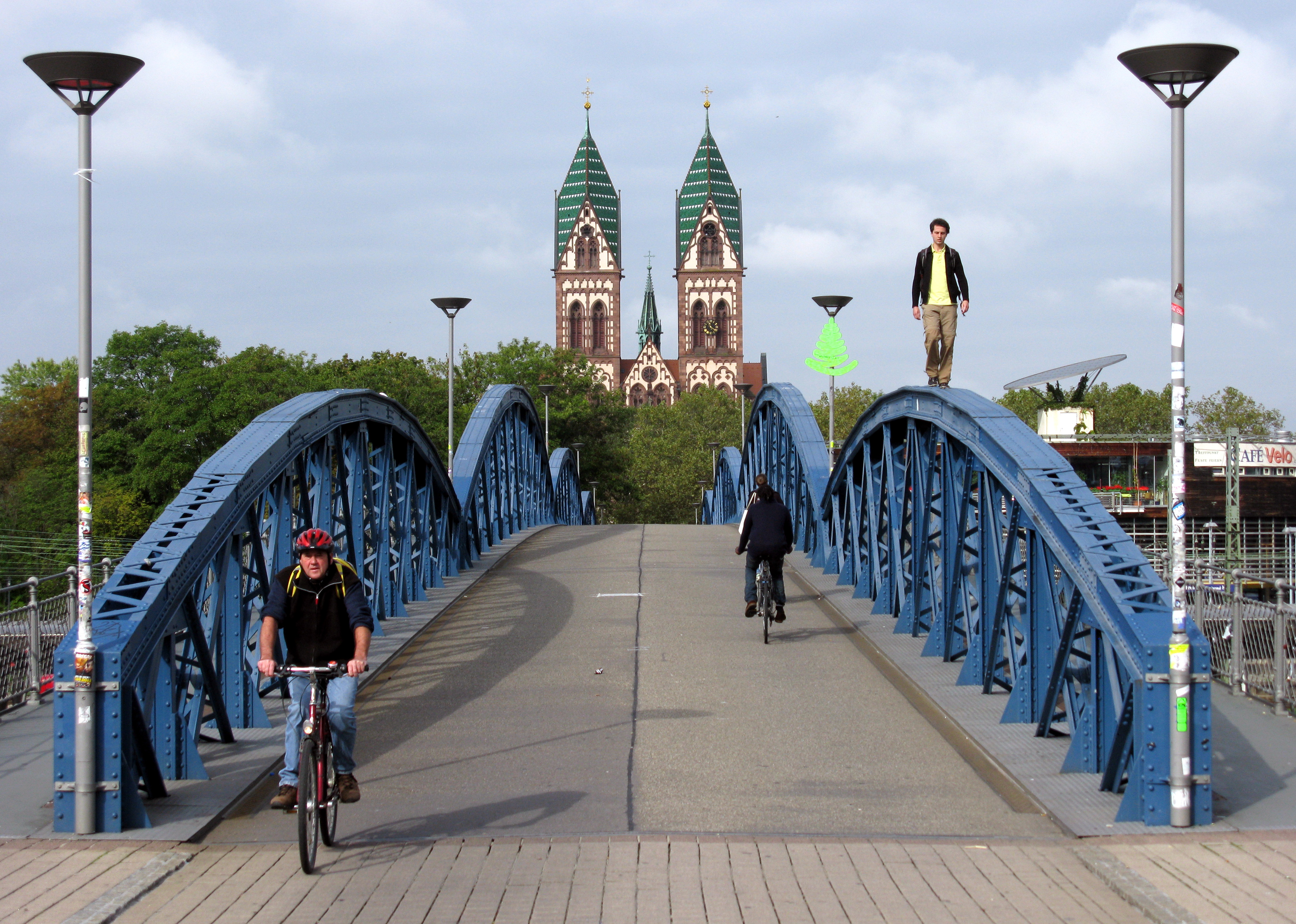 Wiwilibrücke mit Herz-Jesu-Kirche